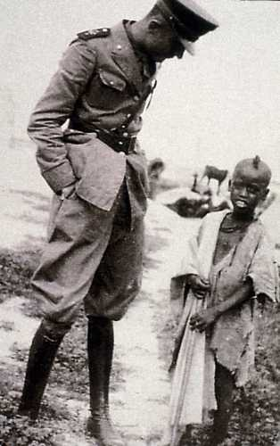 Indro Montanelli in Etiopia nel 1936